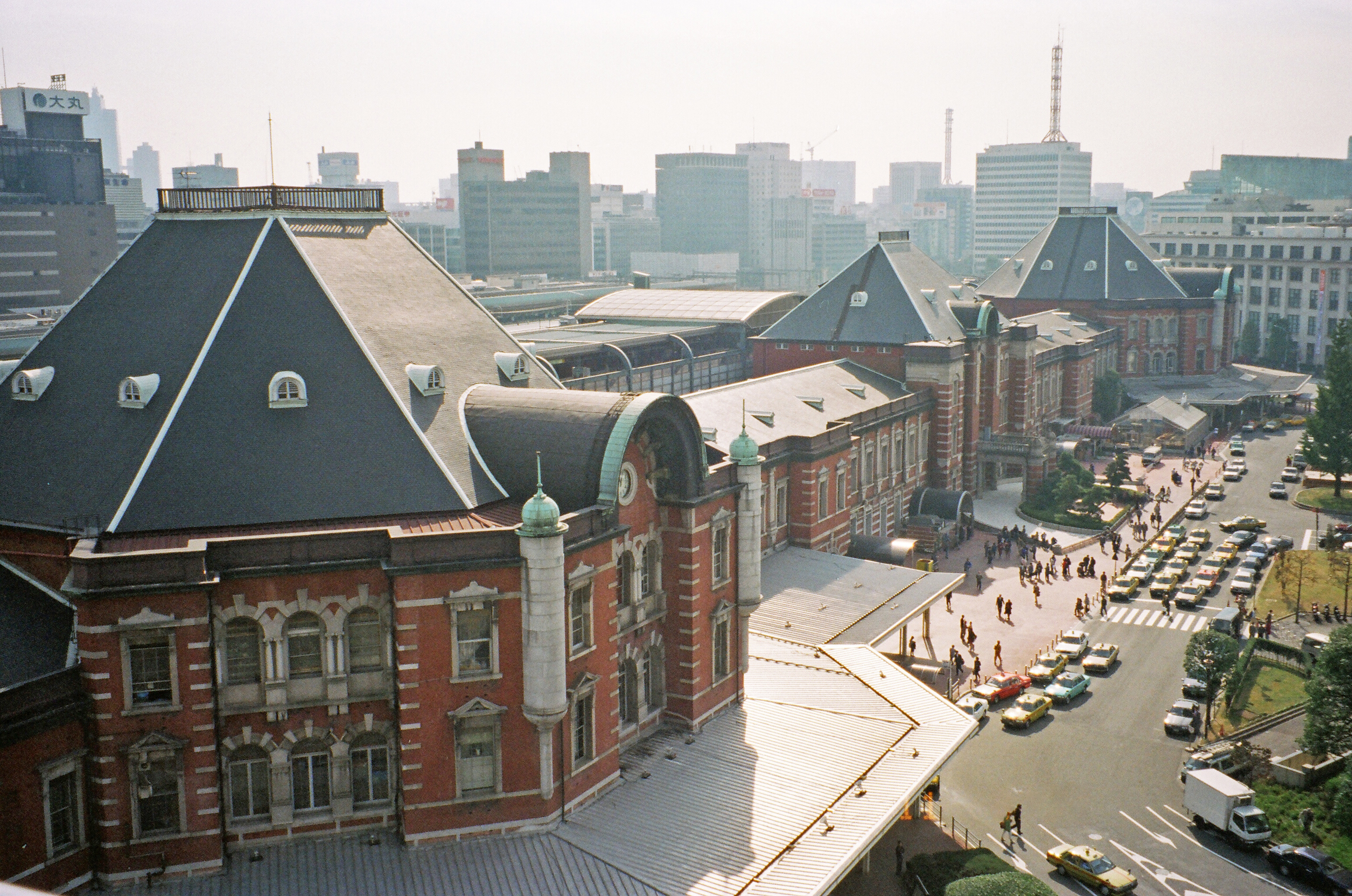 旧国鉄本社ビルから望む東京駅丸の内駅舎（1997年11月8日開催の解体前公開イベントにて撮影）